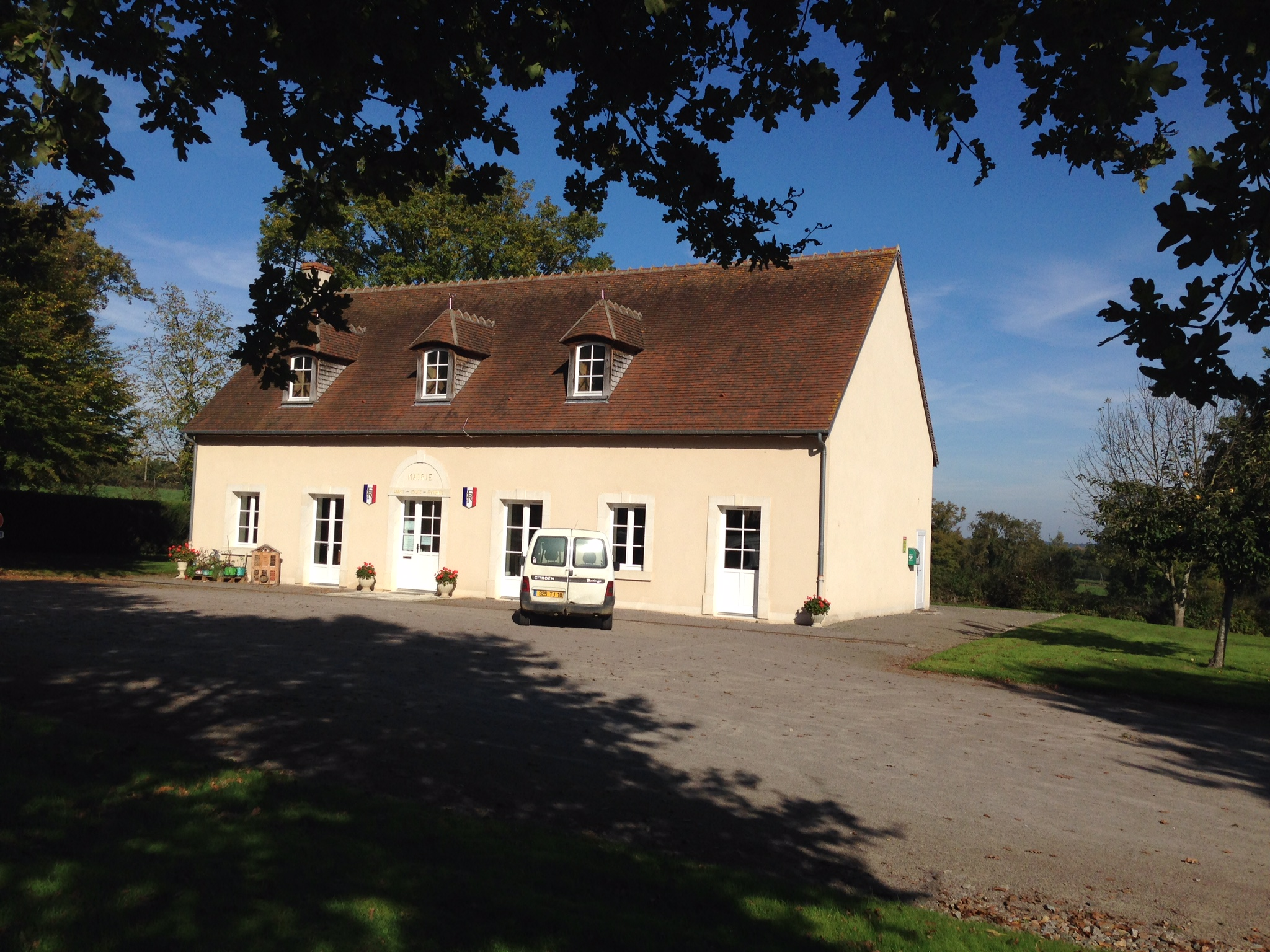 Saint-Pierre-les-Bois - mairie